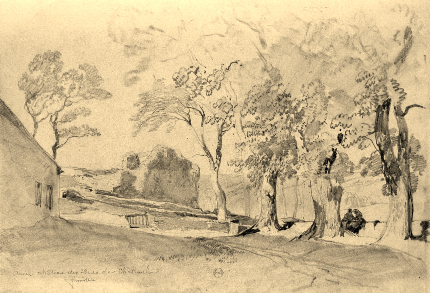 L'ancien château de Châteaulin (dessin d'Eugène Cicéri, vers 1840)